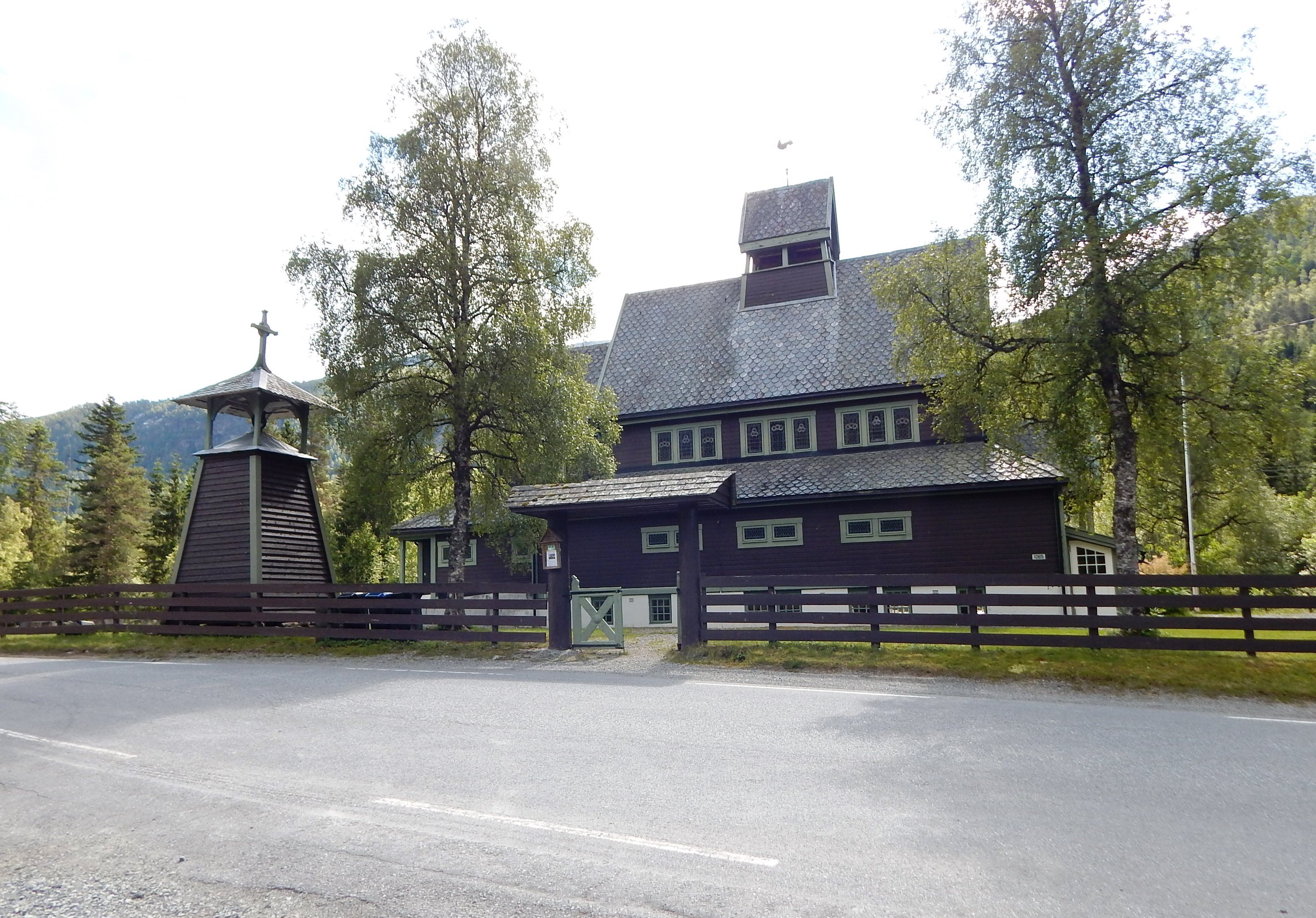 Raundalen kirke ved fylkesvei 307